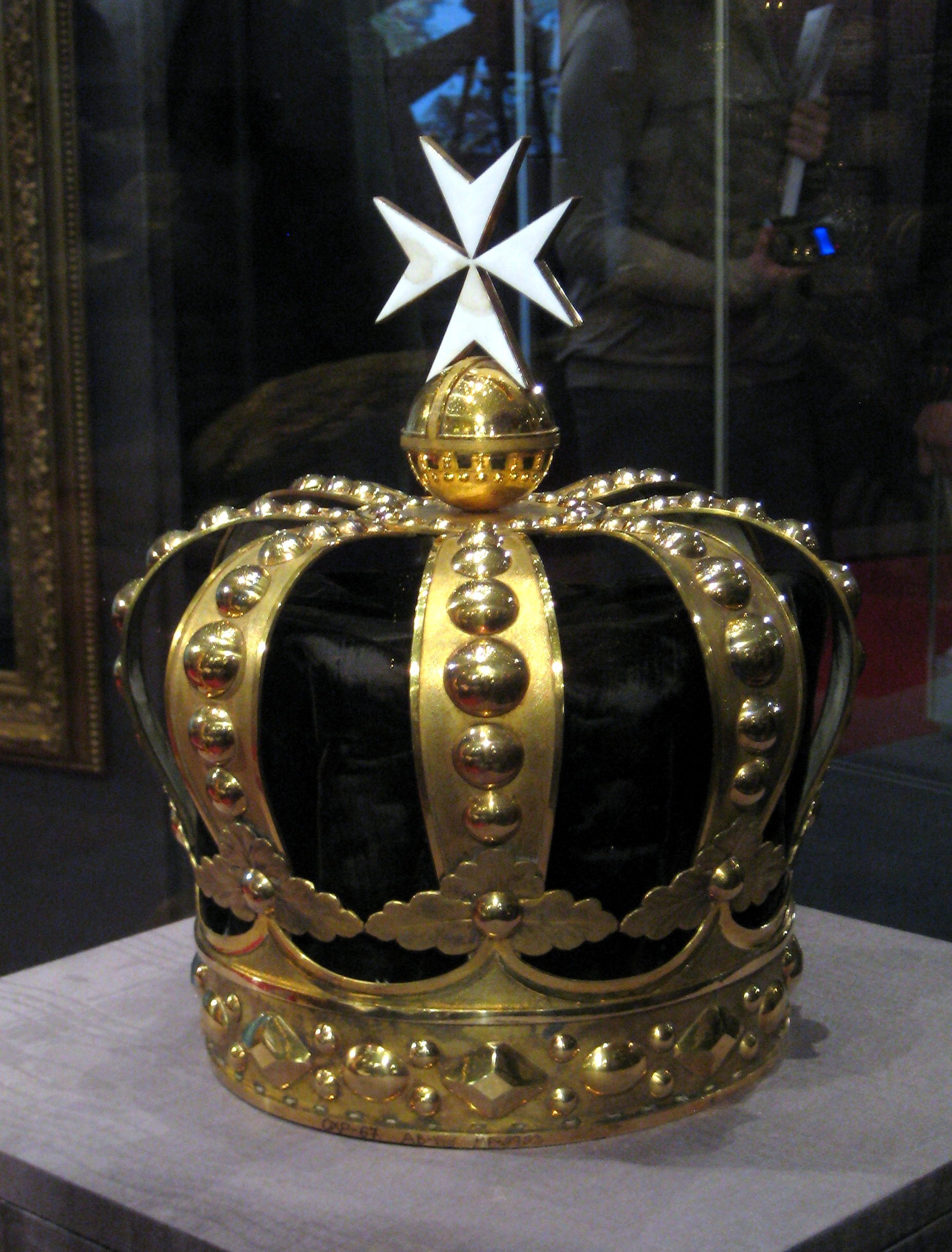 Корона, изготовленная к посвящению Павла I в великие магистры мальтийского ордена. 1798.